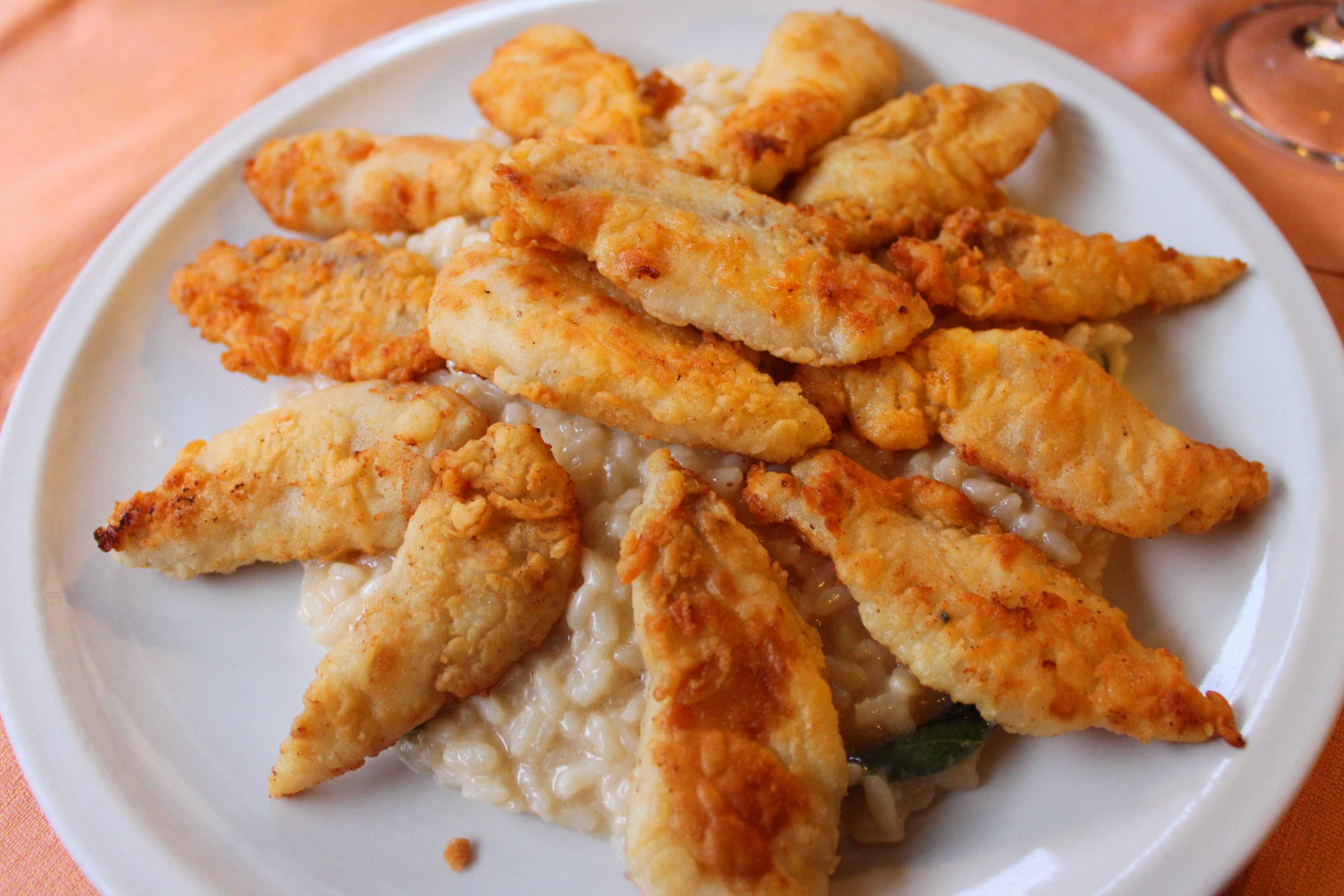 Risotto al persico , Risotto mit Barsch